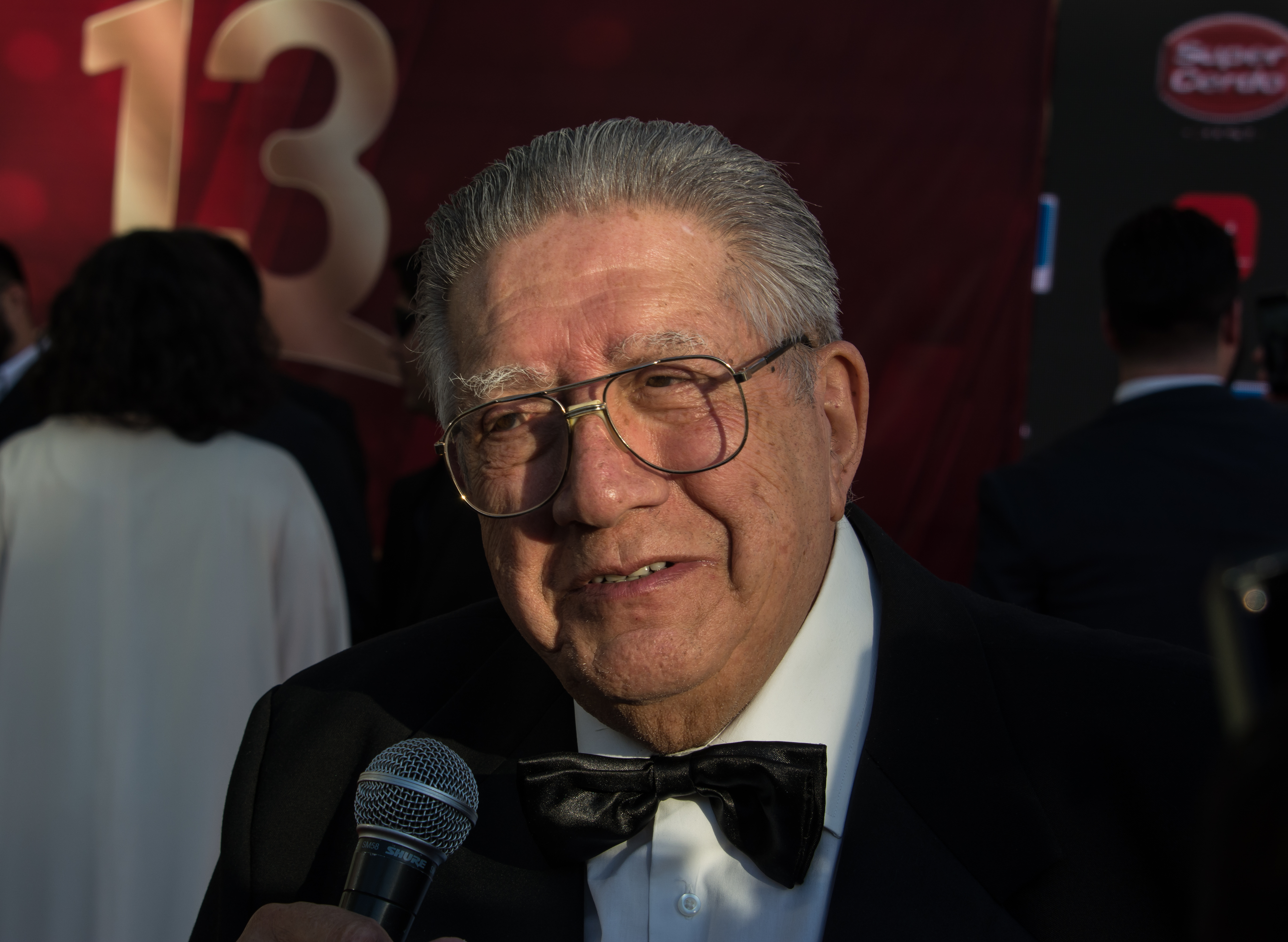 Valentín Trujillo, Copihue de Oro 2018, Sun Monticello, Mostazal, Región de O'Higgins, Chile